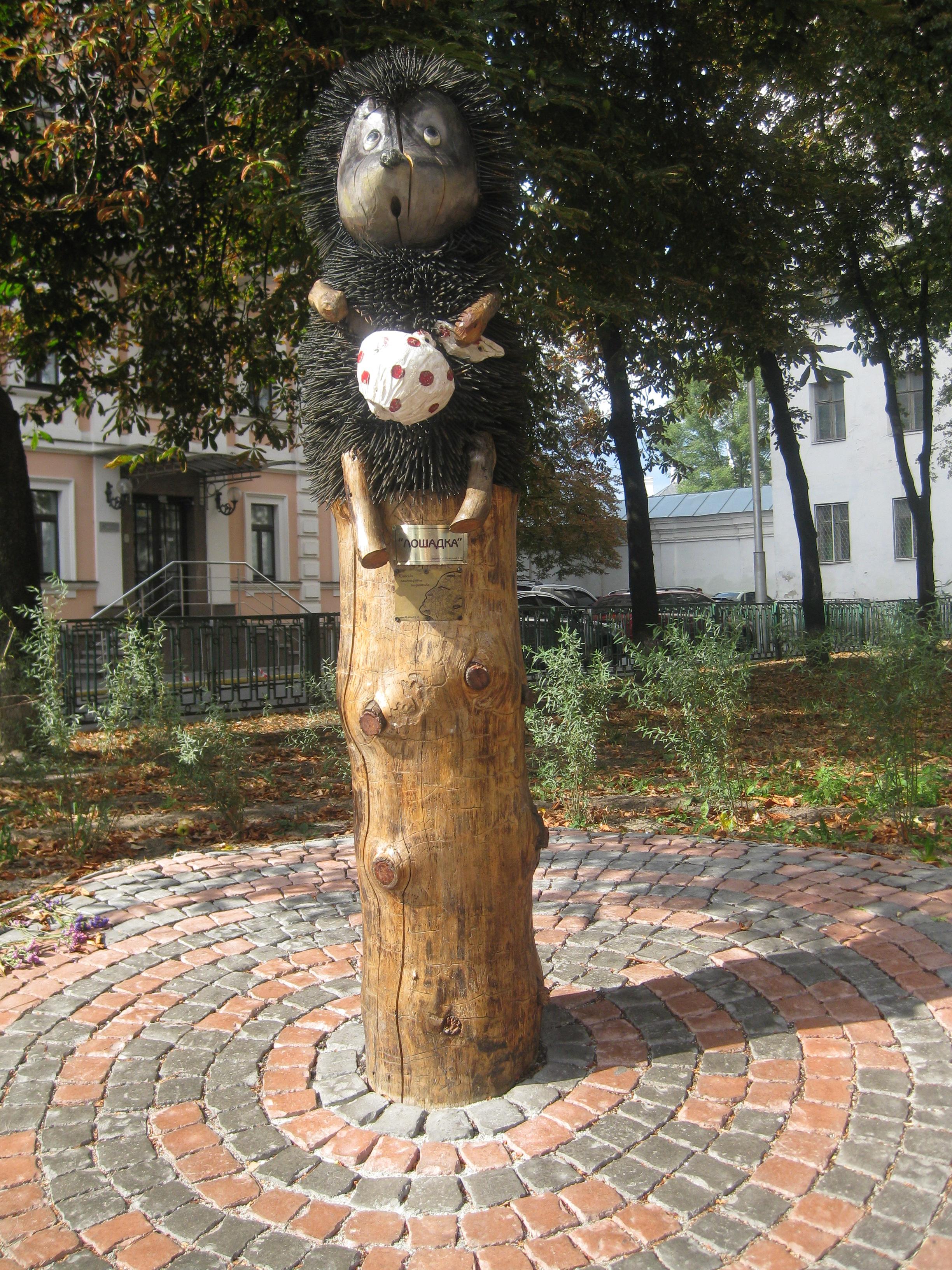 Ein Denkmal von einem Igel, aus einem sowjetischen Zeichentrickfilm "Der Igel im Nebel". Для участі фотографії в конкурсі необхідно виправити ID у відповідності до вказаного у конкурсних списках